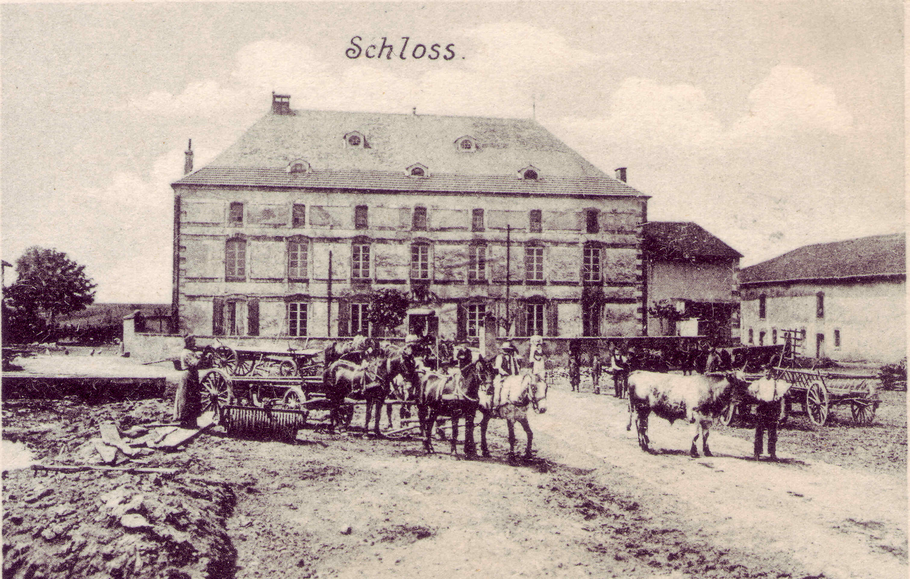 Château d'Helmstatt (XVIIIe) à Francaltroff, Moselle (France) d'après une carte postale de 1905. Détruit à la fin du XXe siècle.